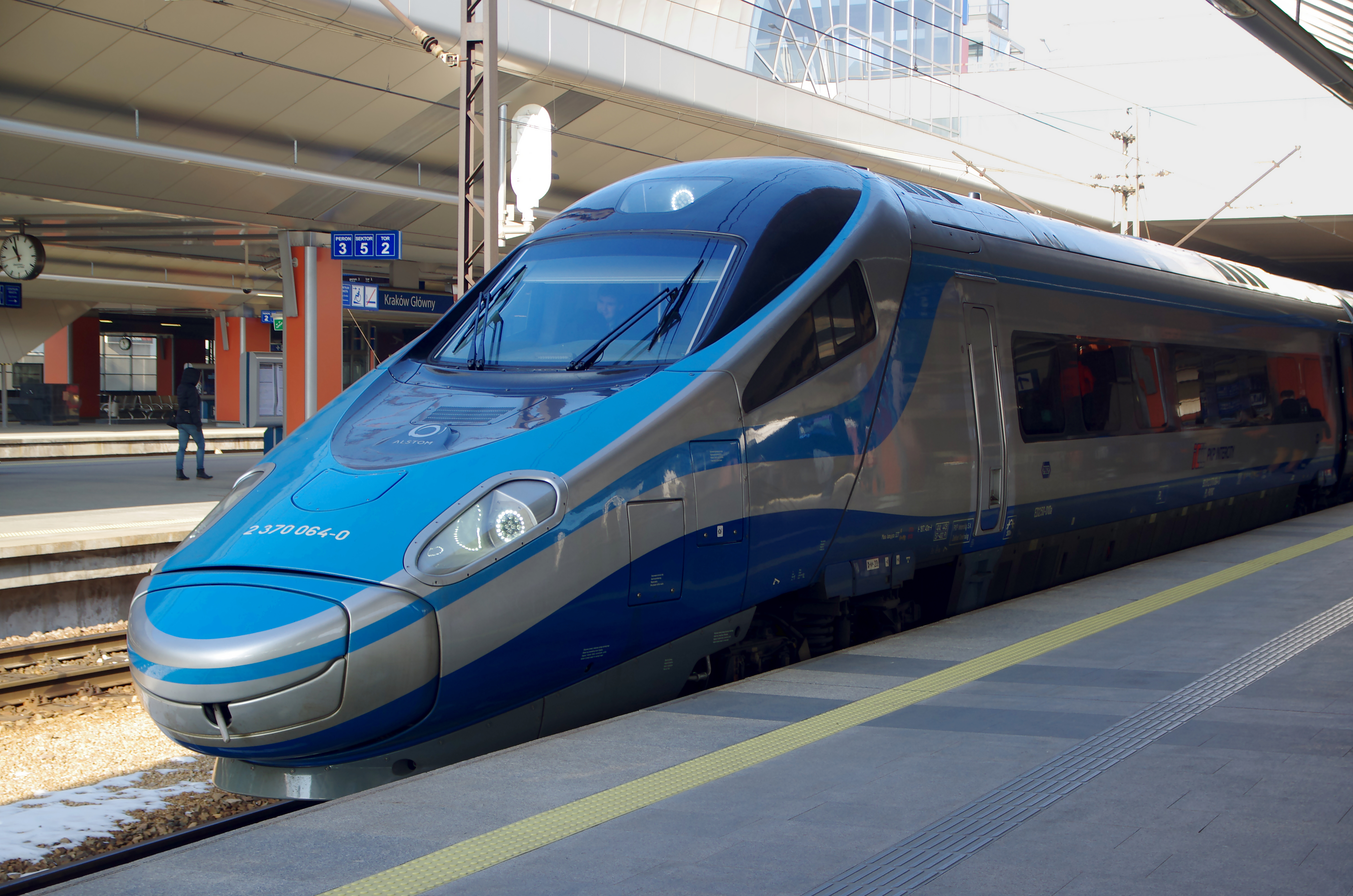 ED250-010 "Pendolino" na dworcu w Krakowie